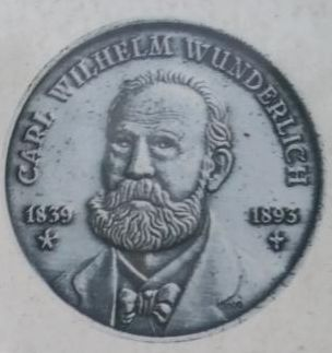 Das Bild befindet sich auf der Gedenktafel für Carl Wilhelm Wunderlich auf dem Friedhof zu Meerane.